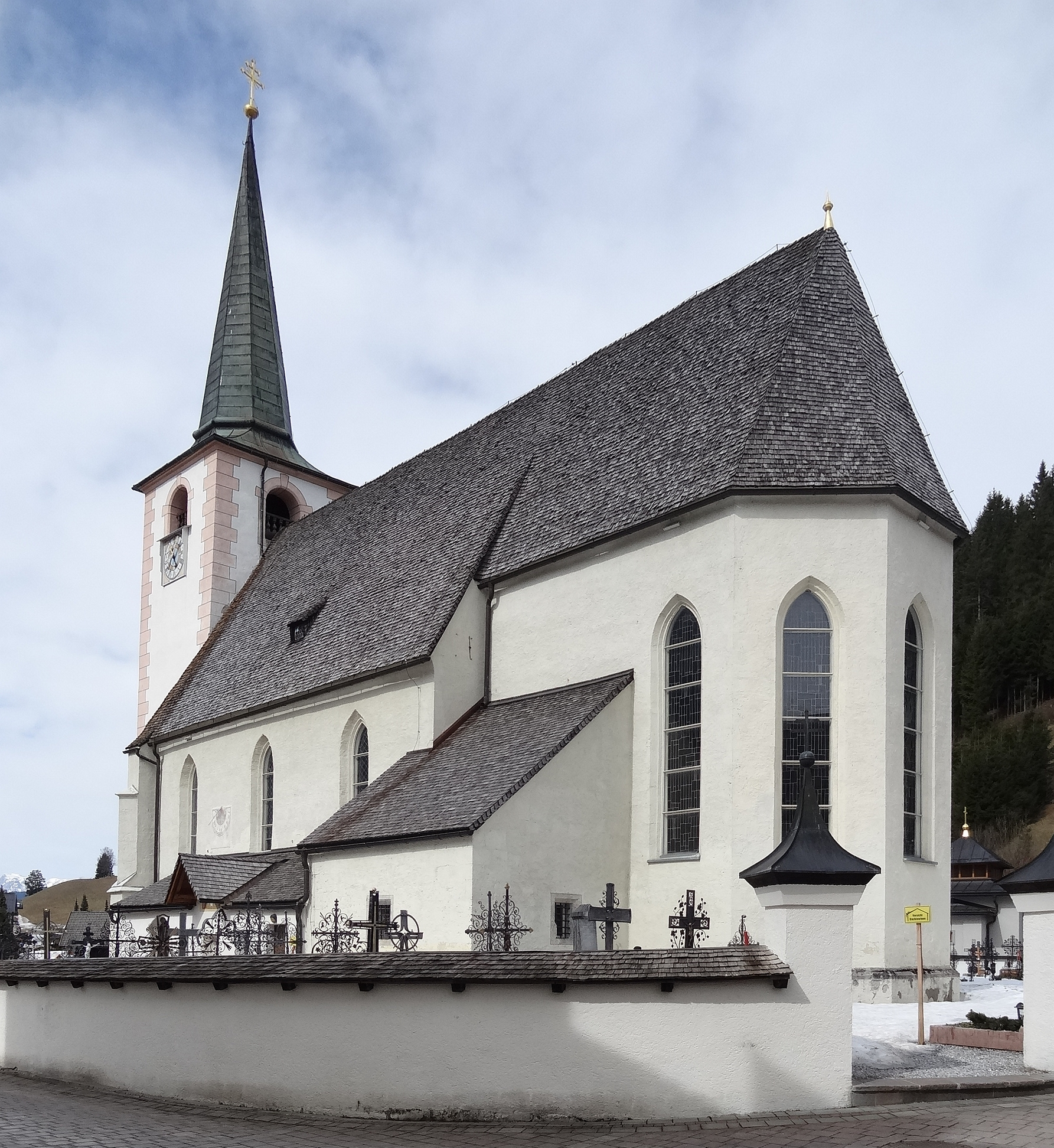 Exterior of Saints Peter and Paul Church (Filzmoos)